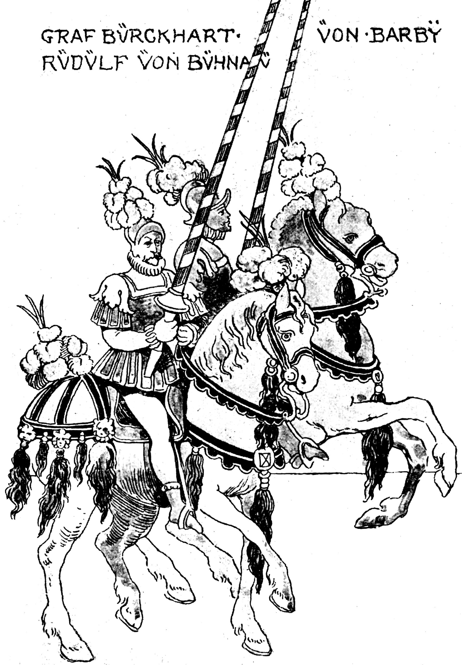 Beschreibung des gegenüberstehenden Bildes. Darstellung aus einem Album in der Königl. Bibliothek zu Dresden, enthaltend 67 Blatt kolorierte Kupferstiche im Querformat. Betitelt: Contrafaktur des Ringkrennens, so auf des Durchläuchigenn Hochgeborenen Fürsten und Herrn, Herrn Christiani Hertzogen in Sachsen etc. Fürstlichen Beilager denn 25 Aprillis Anno [15]82 in dem Churfürstlichen Schloß zu Dresden gehalten worden, mit wasserley invention eine jede Part uff die Bahn kommen und daselbst gantz ritterlich zierlich und herrlich vollbracht.